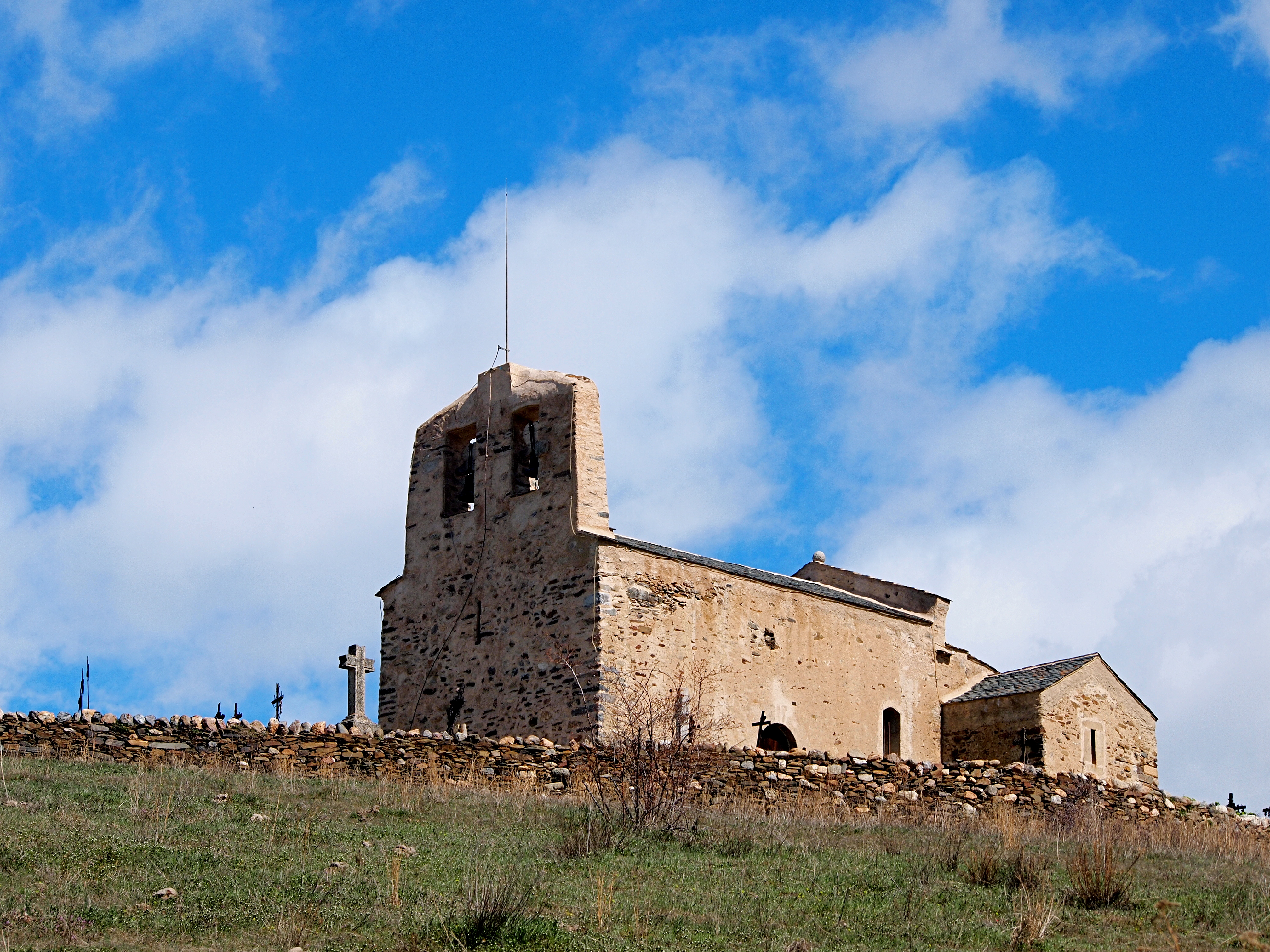 Església romànica de Sant Bartomeu de Bajande.